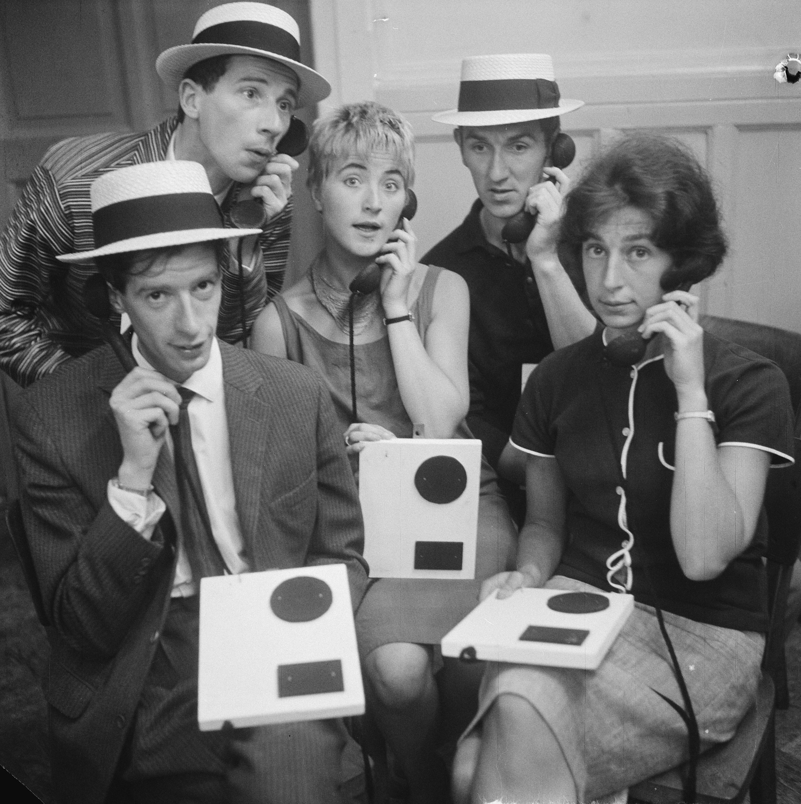 Collectie / Archief : Fotocollectie Anefo Reportage / Serie : [ onbekend ] Beschrijving : Show van Rudi Carrell. Rudi Carrell, Ben Rowold, Jasperina de Jong, Eric Herfst, Fiet Koster Datum : 27 juni 1961 Trefwoorden : shows Persoonsnaam : Carrell, Rudi, Herfst, Eric, Jong, Jasperina de, Koster, Fiet, Rowold, Ben Fotograaf : Nijs, Jac. de / Anefo Auteursrechthebbende : Nationaal Archief Materiaalsoort : Negatief (zwart/wit) Nummer archiefinventaris : bekijk toegang 2.24.01.03 Bestanddeelnummer : 912-6595